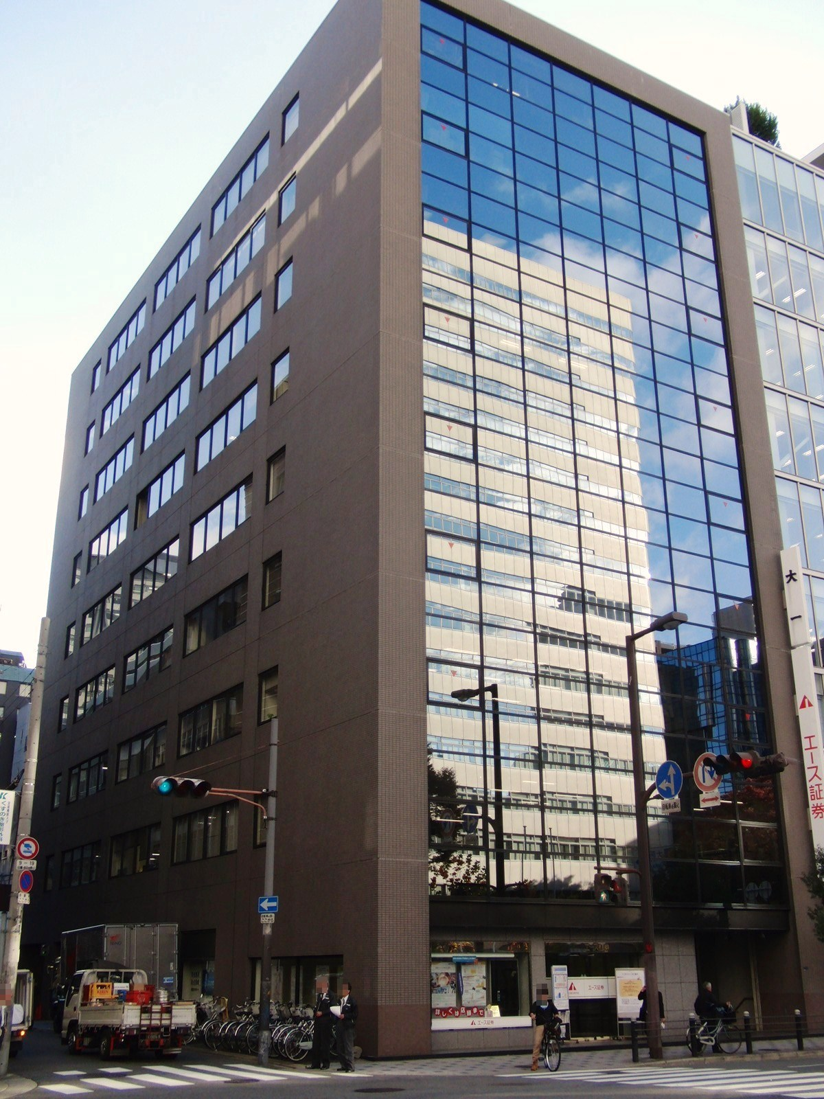 エース証券本社を撮影